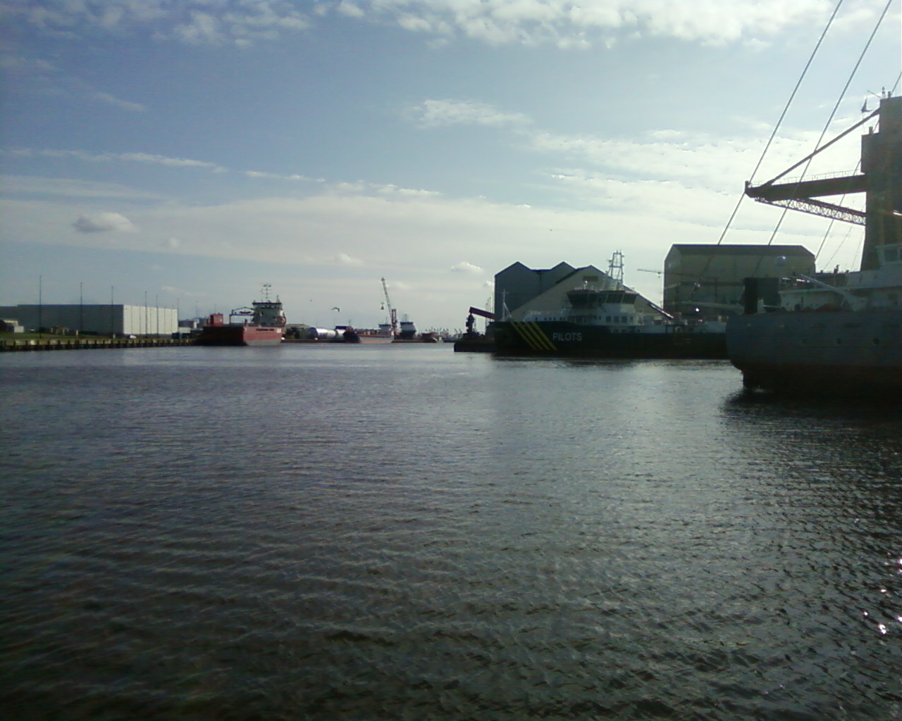 Nije haven yn Harns